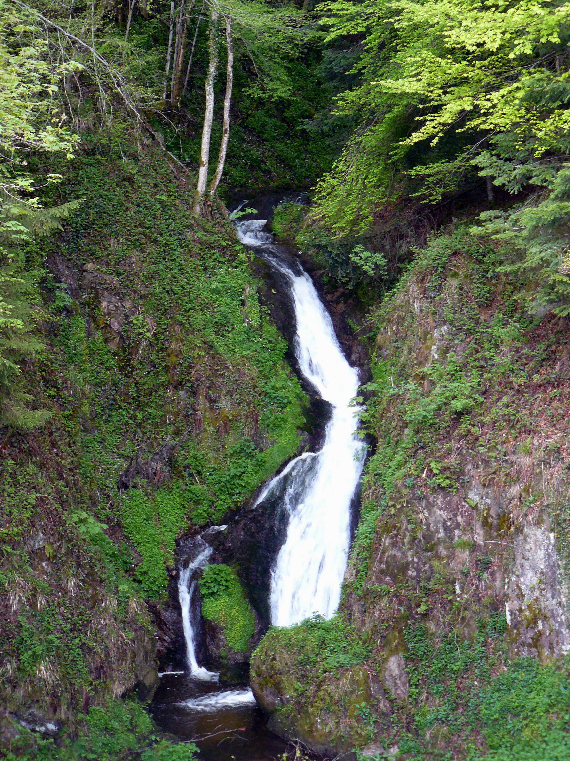 La cascade du Tampa à Corravillers (Haute-Saône, France)